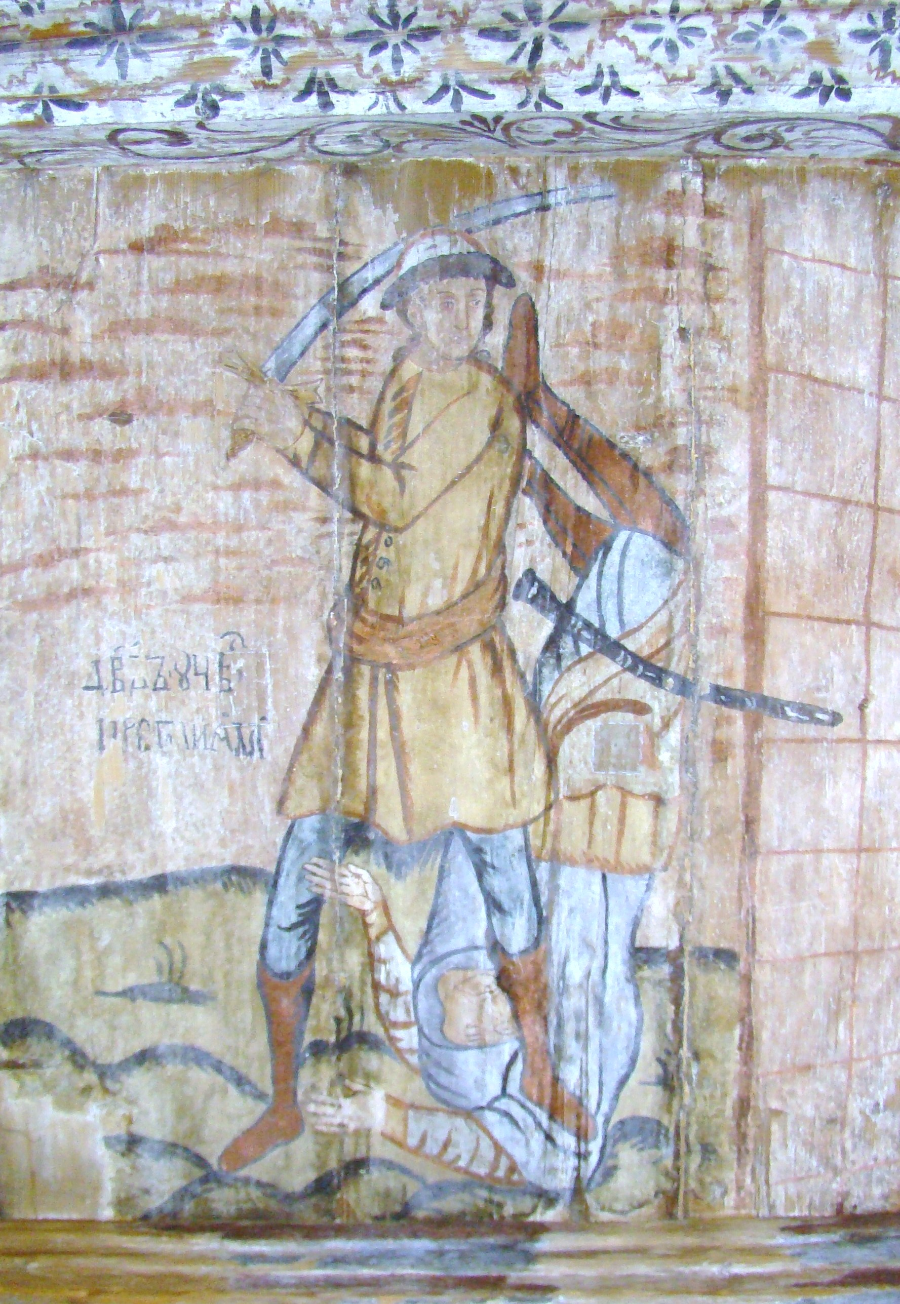 Biserica de lemn "Sfântul Nicolae", sat BOGDAN VODĂ